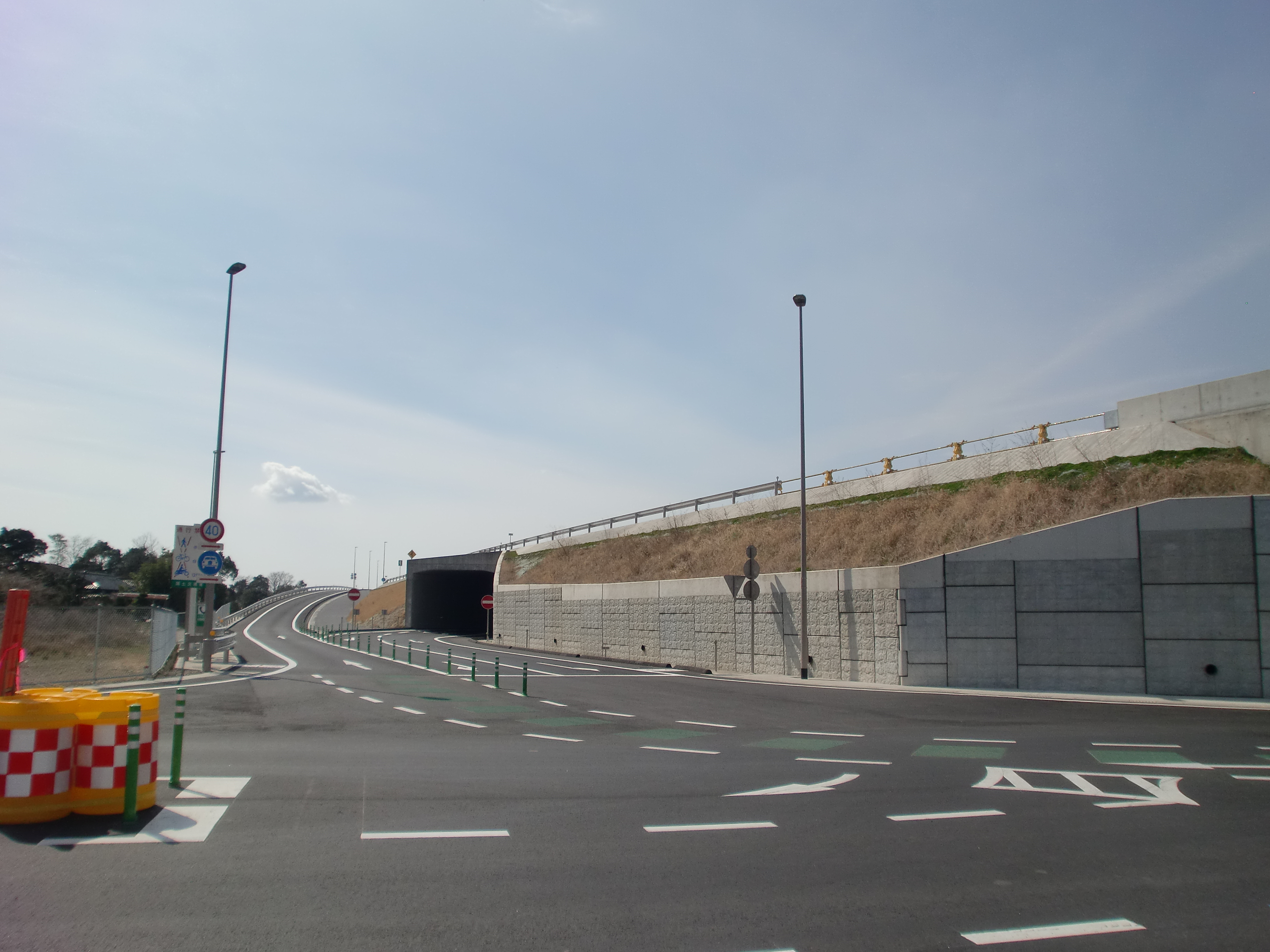 高尾野北ICの鹿児島方面出入口。